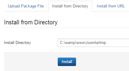 Joomla Installation extension